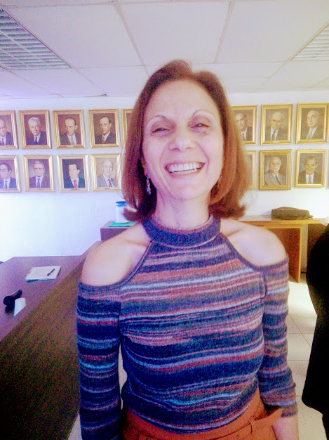 Sary Levy, profesora, economista de la Universidad Central de Venezuela